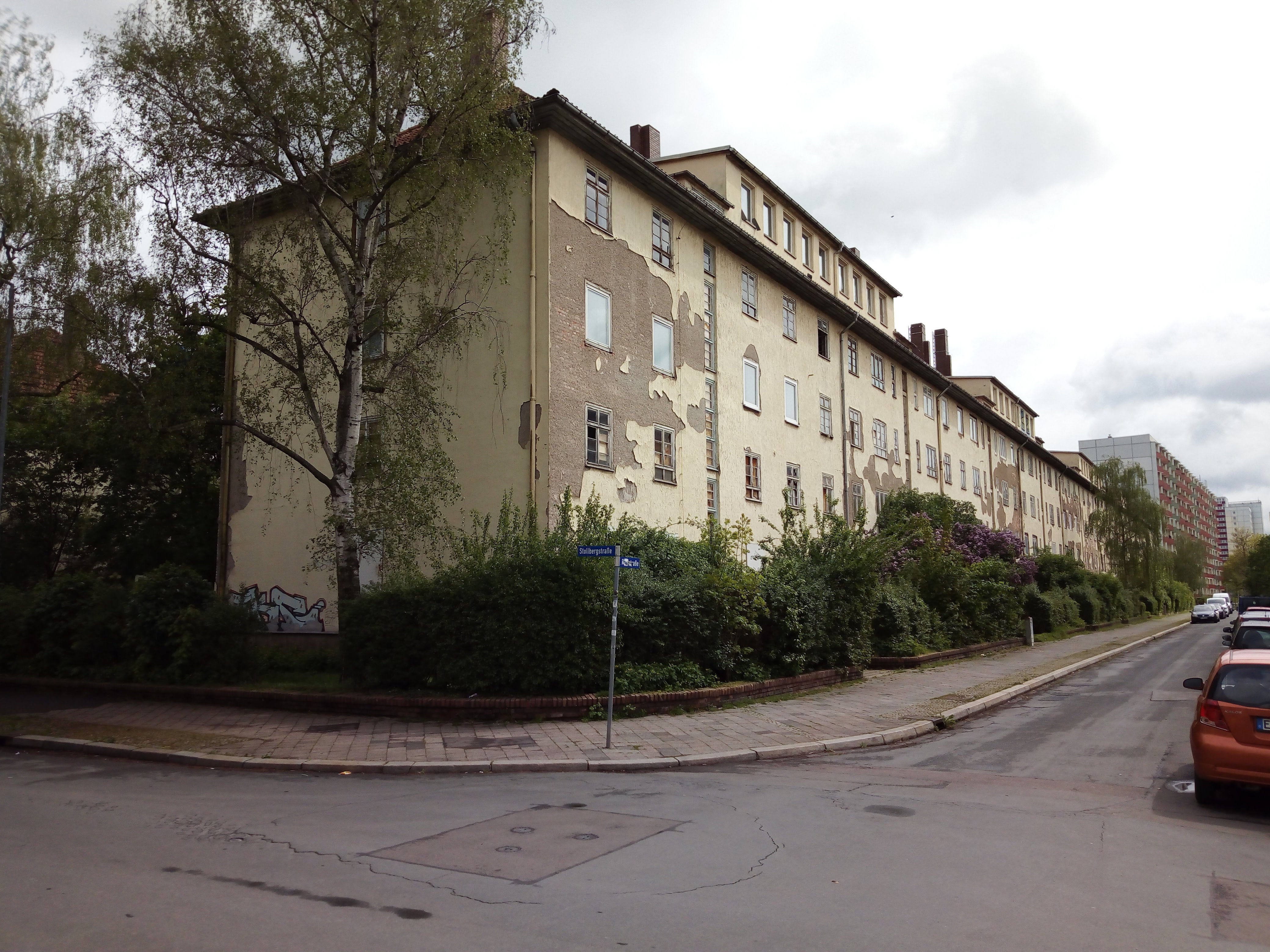 Wohnblock in der Feldstraße (37-45) - Erfurt